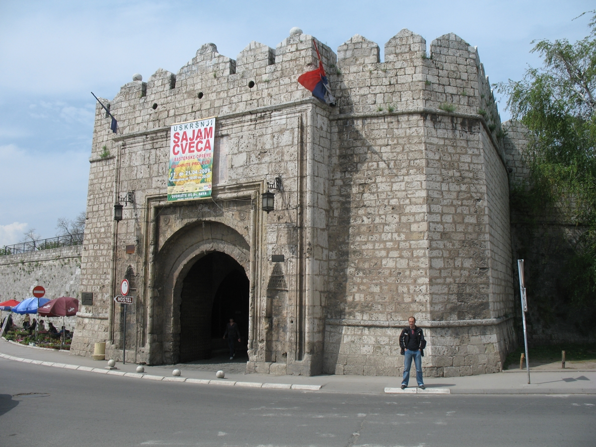 Stambol-kapija ((I)Stambul Gate) in Niš fortress, Serbia.